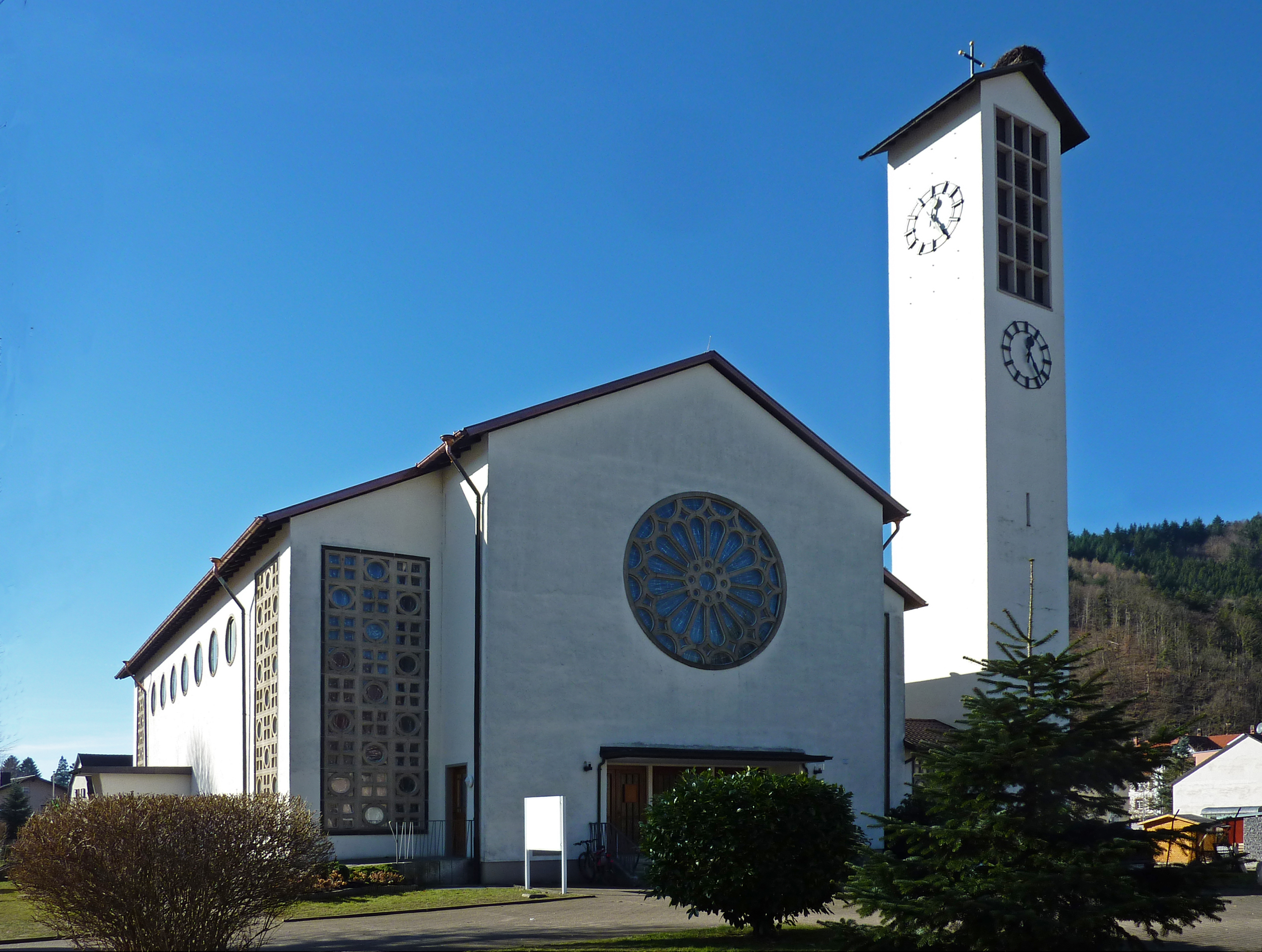 St. Michael Katholische Kirche (Baujahr 1964), Gutach im Breisgau